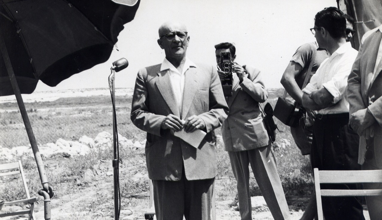 יעקב הוזמן במהלך טקס חנוכת נמל התעופה אילת